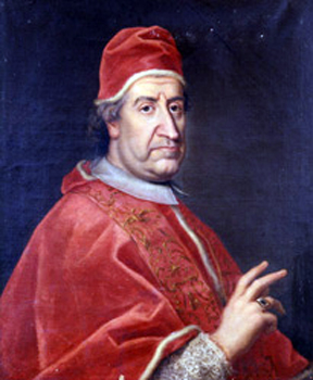 Portrait of Pope Clement XI (1649-1721)